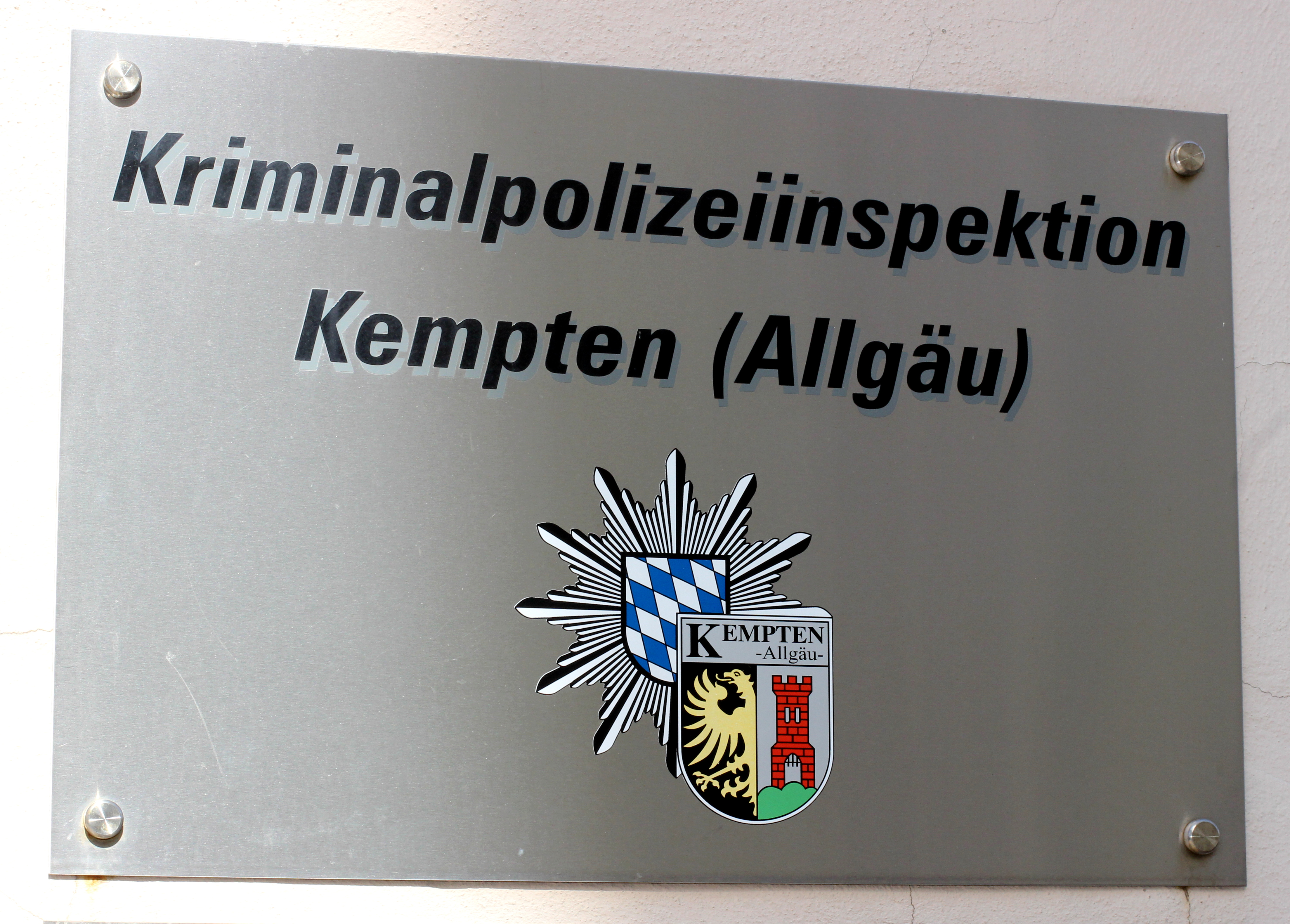 Schild am Eingang der (berüchtigten) Kripo Kempten